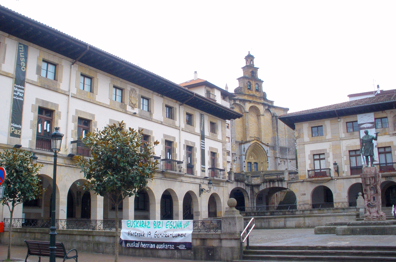 Guernica - Foru Plaza 1